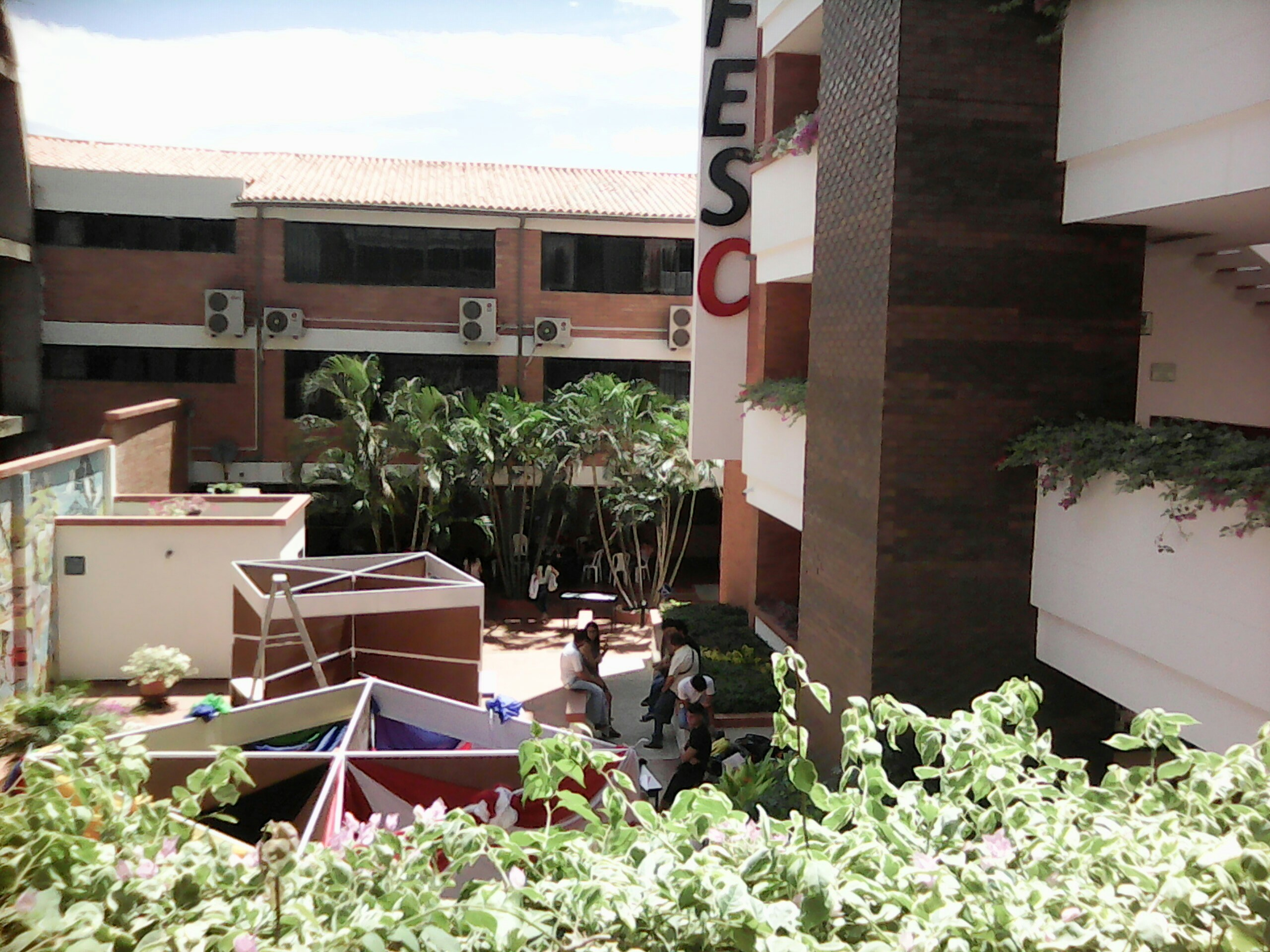 Vista del edificio bloque A desde el edificio bloque C.